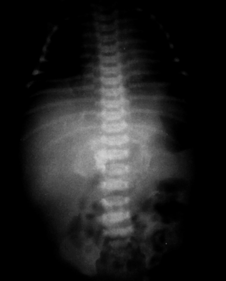 ASP d'un foetus in foetu reconnaissable transversalement aux vertèbres L1-L2. Pôle céphalique à droite du rachis et les deux fémurs à gauche.